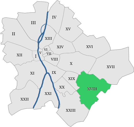 map hungary budapest district 18